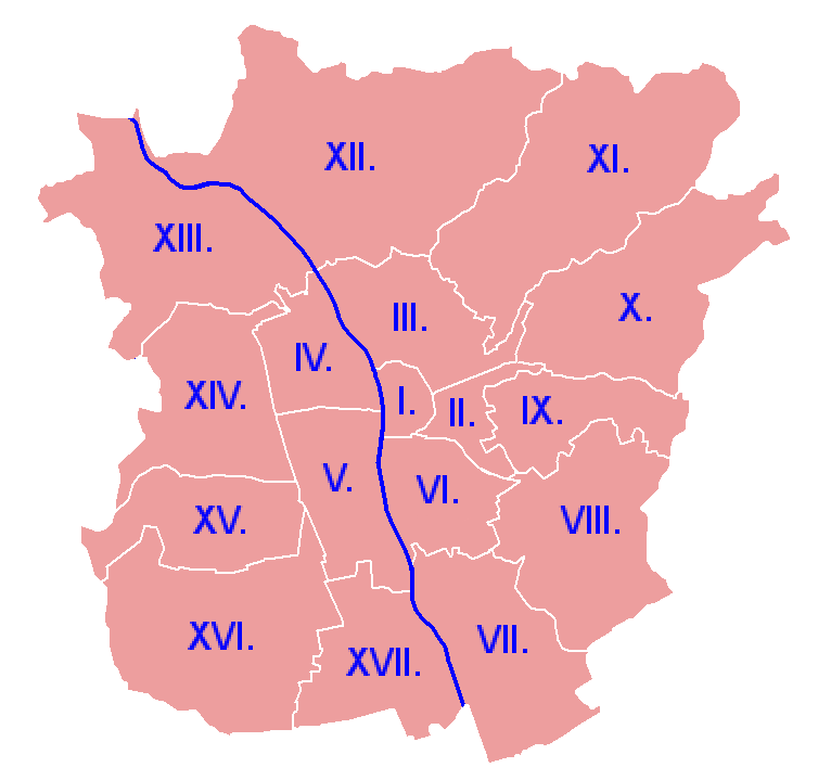 Grazer Stadtbezirke